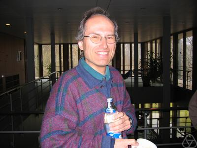 Foto di Robert Tichy